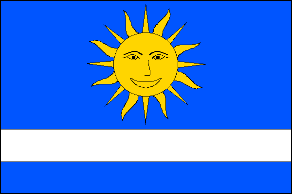 vlajka, Věžky, okres Přerov